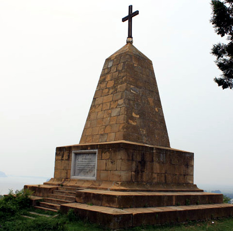 паметник в чест на руските войски участвали в освобождението на Никопол на 4 юли 1877 г.